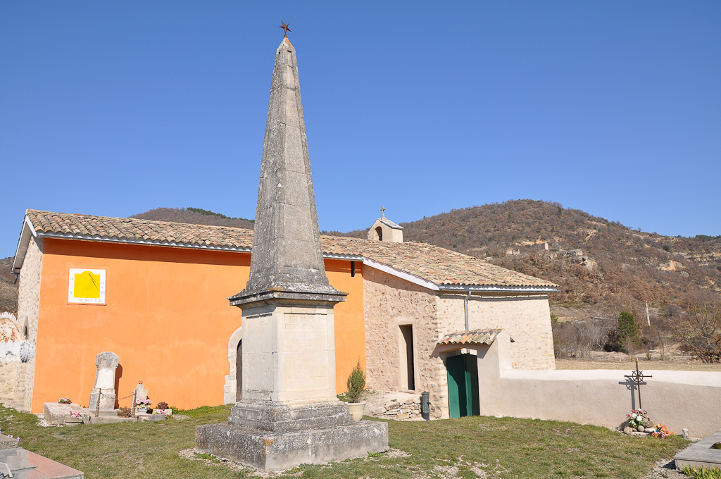 Mirabeau, chapelle de Beauvezet